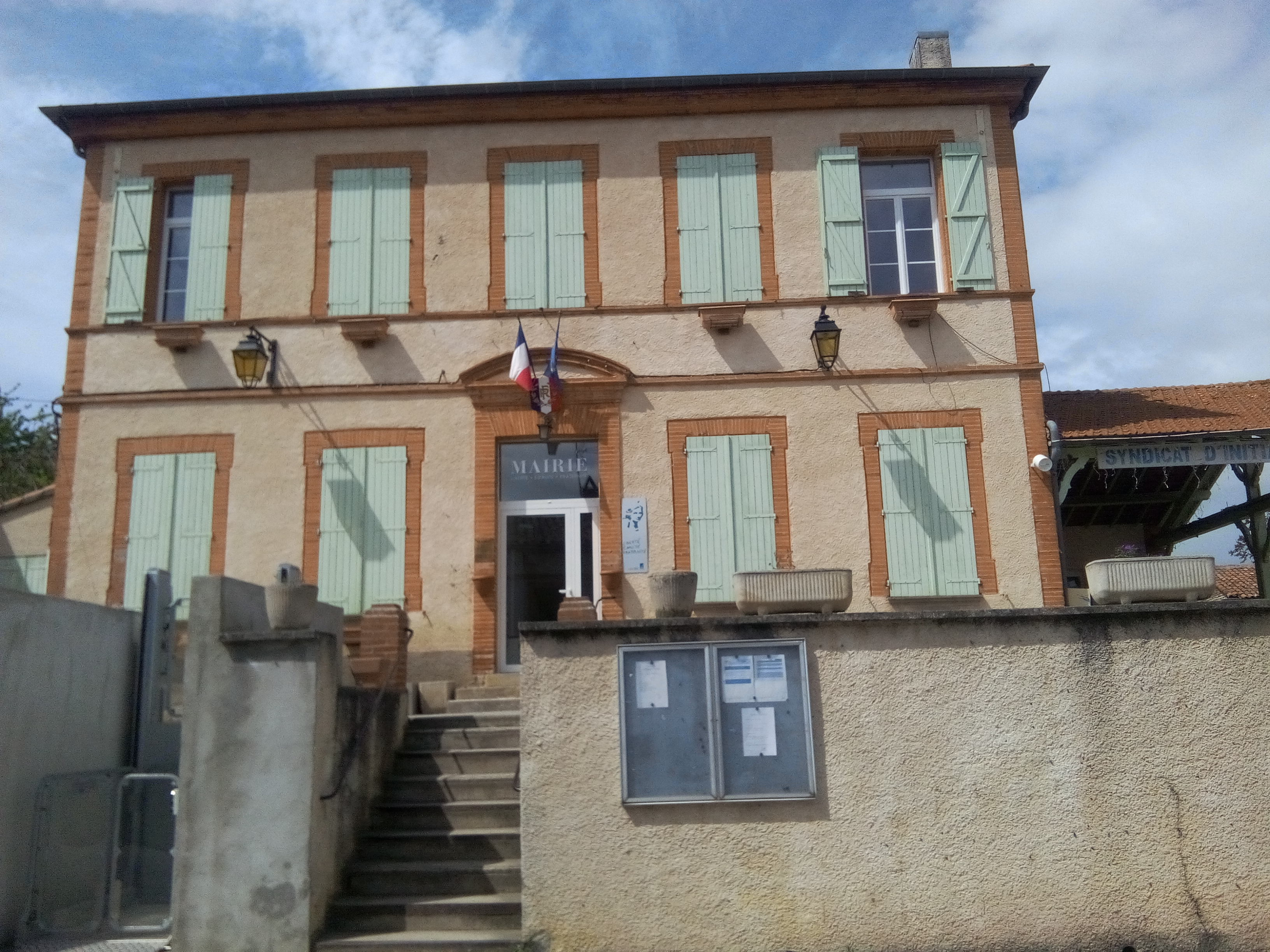 Mairie de Mauressac